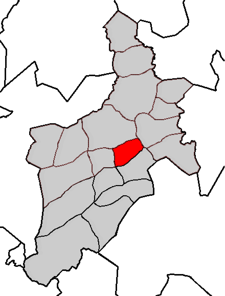 Situación da parroquia de Cerneda no concello de Abegondo